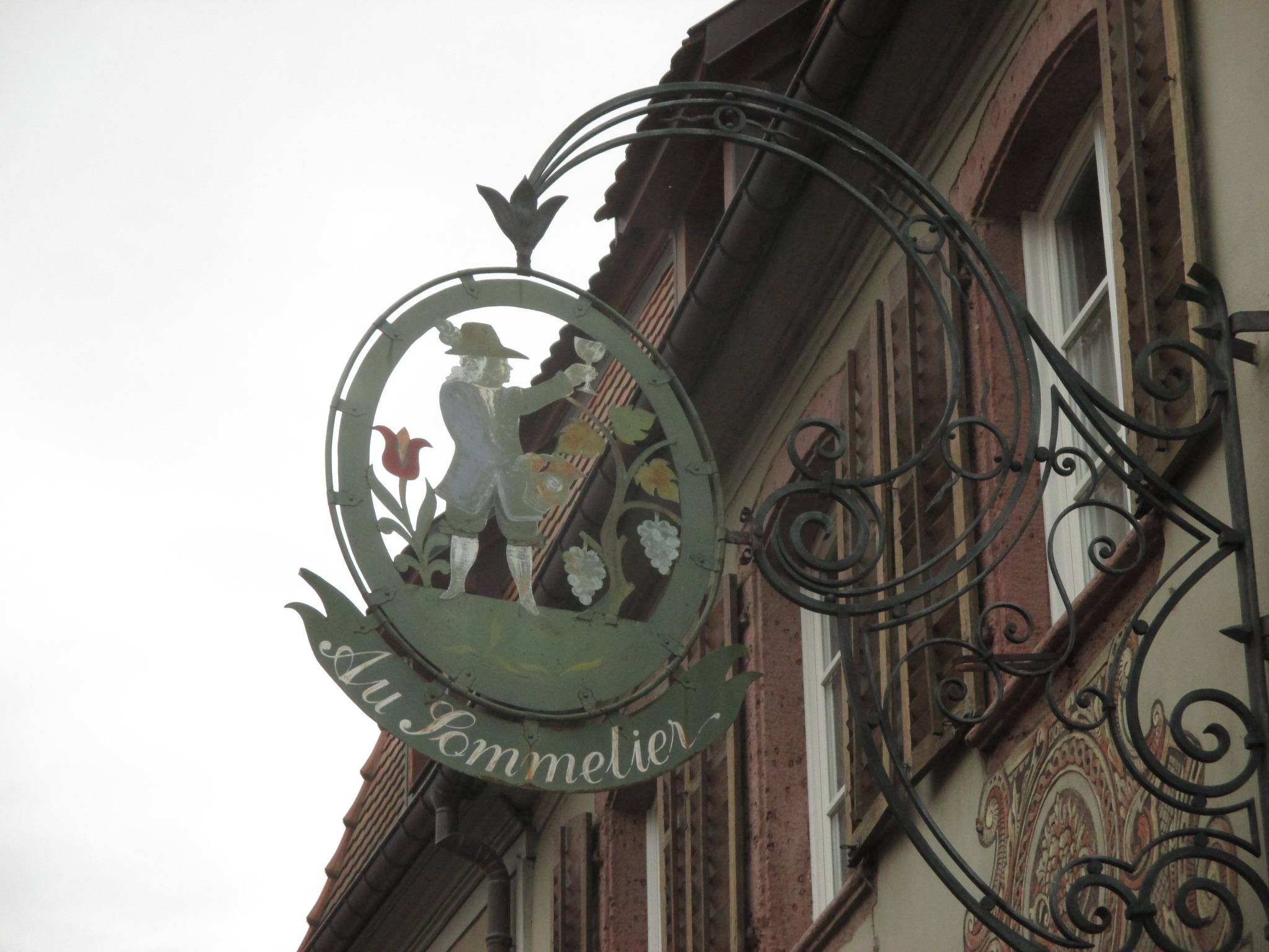 Enseigne alsacienne Au sommelier, 51 Grand Rue, Bergheim